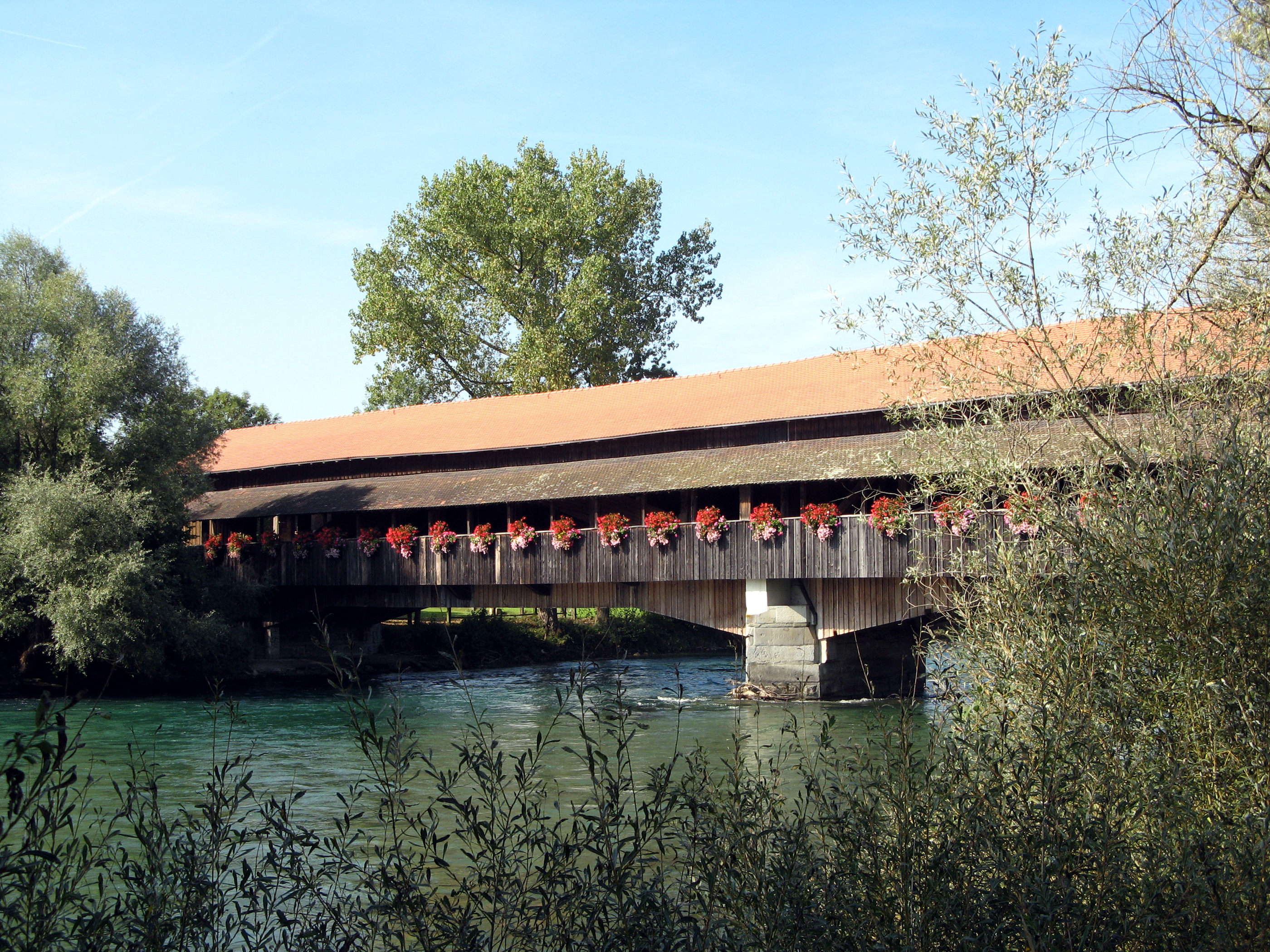 Reussbrücke Sins–Hünenberg, von Südosten her gesehen (Zuger Seite)